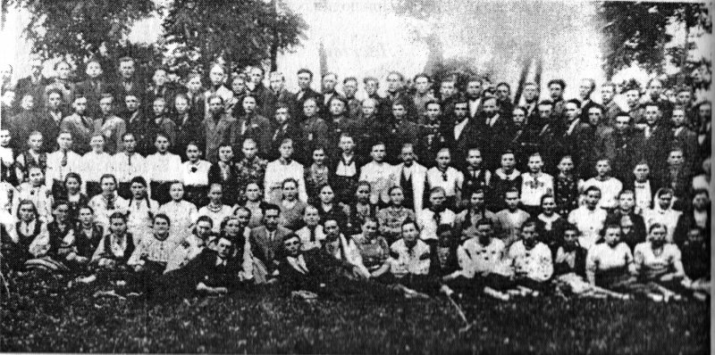 Товариство «Січ» у селі Ласківці